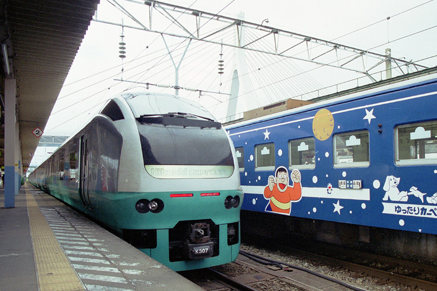 青森駅に到着した青森ねぶた号